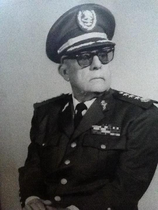 militar mexicano de excelencia